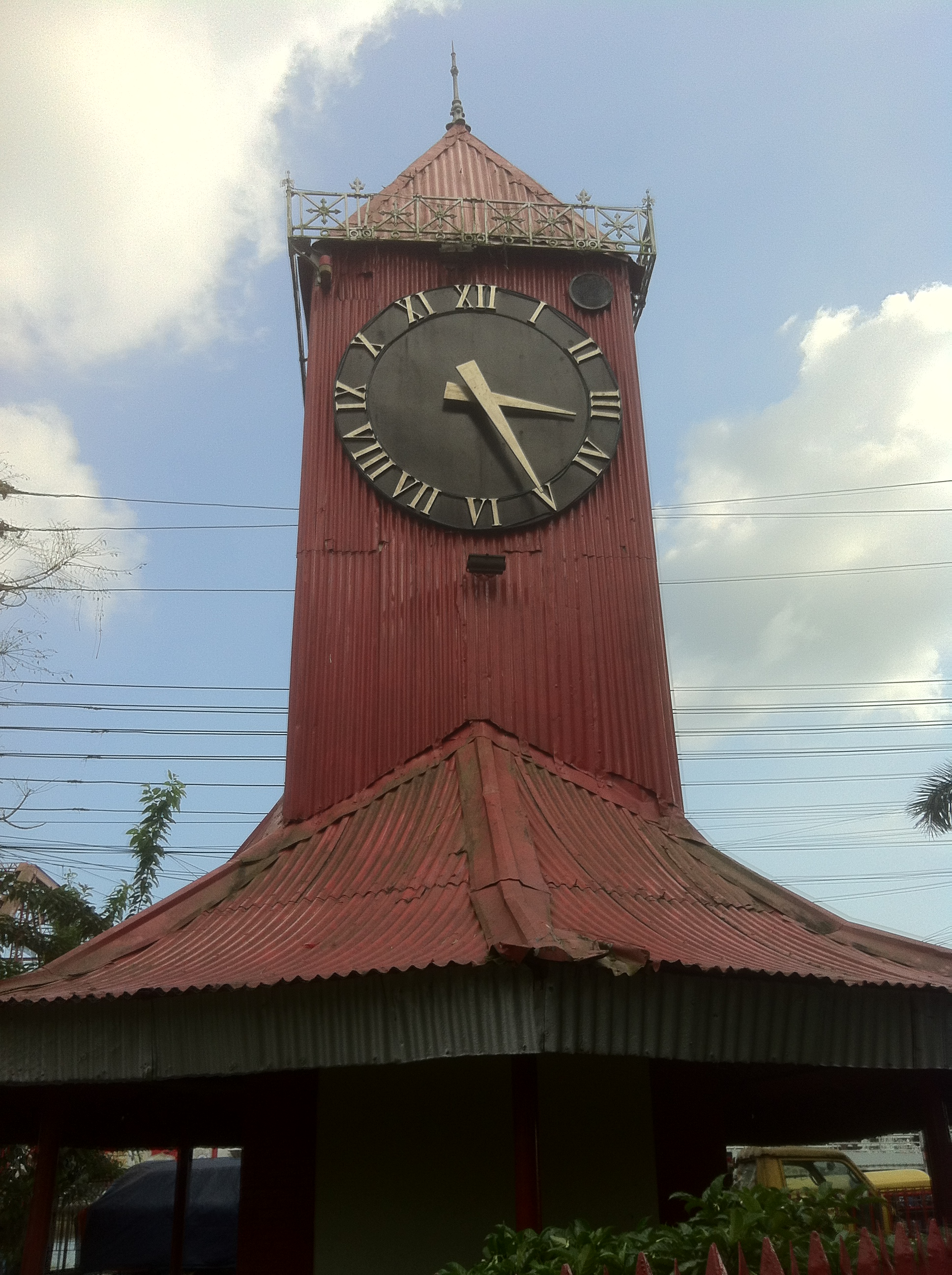 আলী আমজদের ঘড়ি